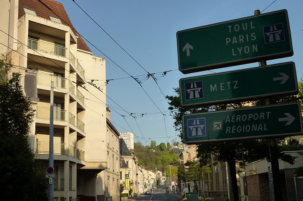 Lignes aériennes de contact (bifilaires) du réseau de trolleybus de Nancy, rue de l'Armée Patton.